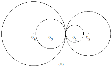 Faisceau de cercles tangents